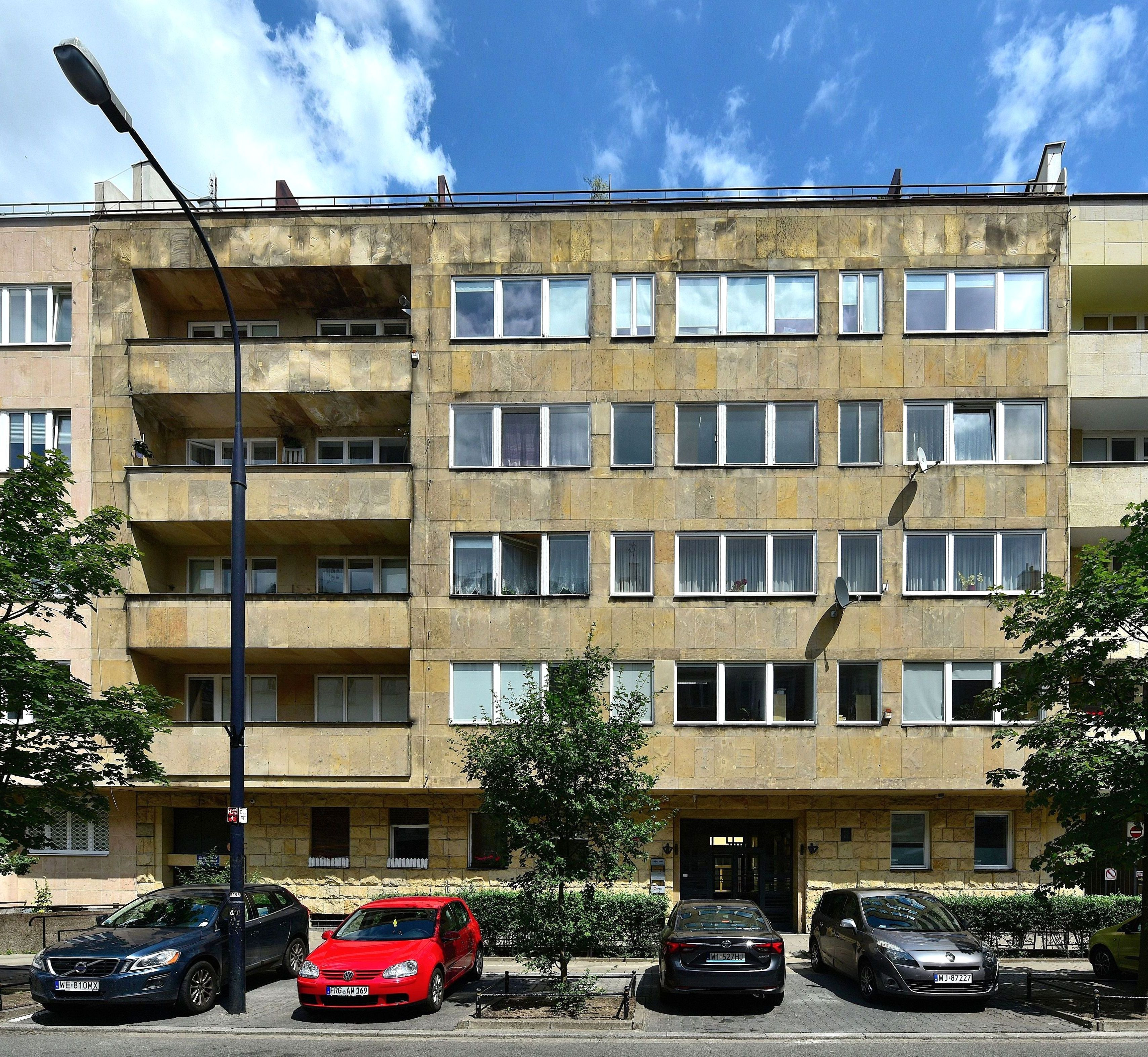 Budynek przy ul. Wiejskiej 16 w Warszawie